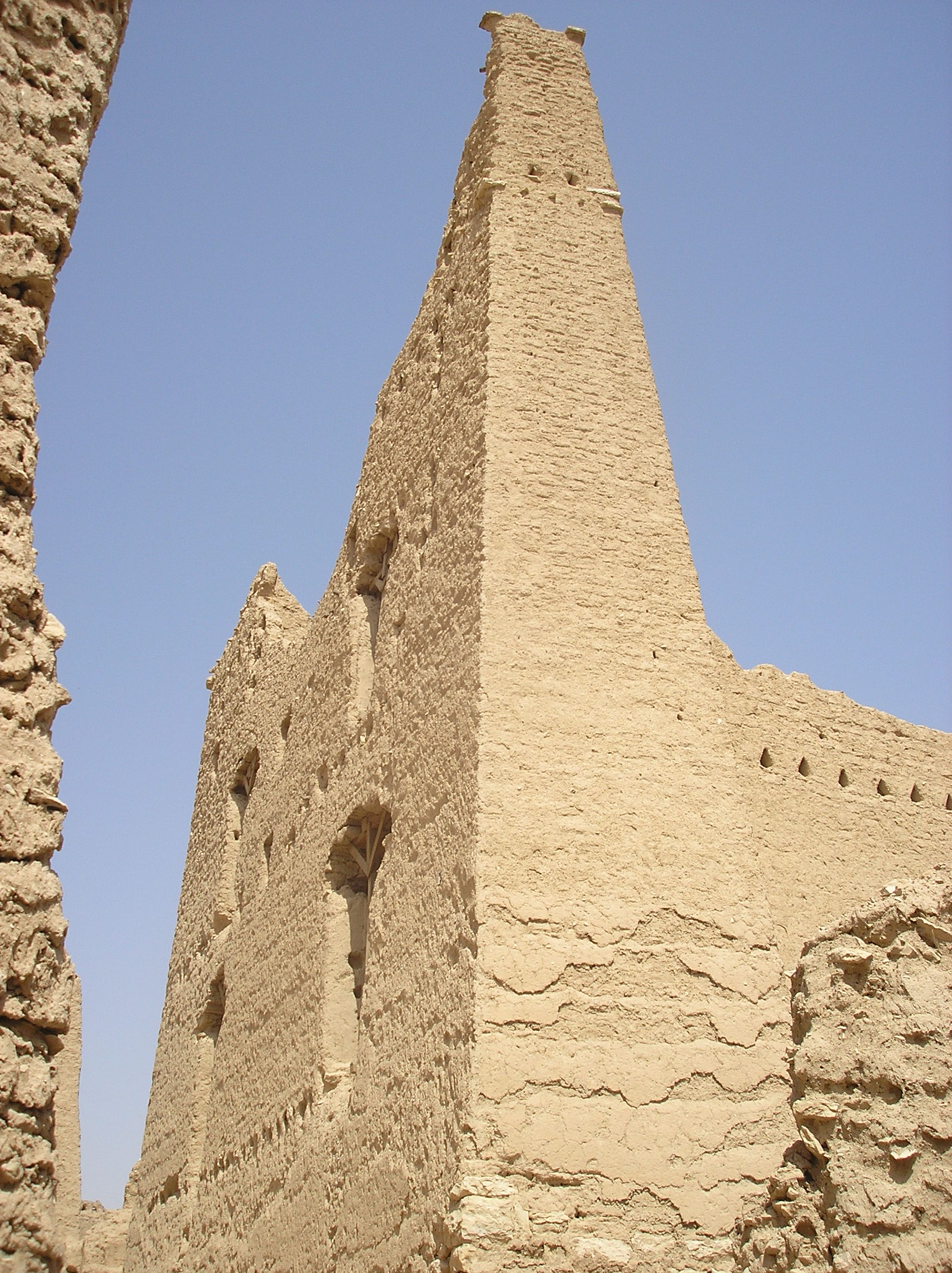 Dir'iyyah